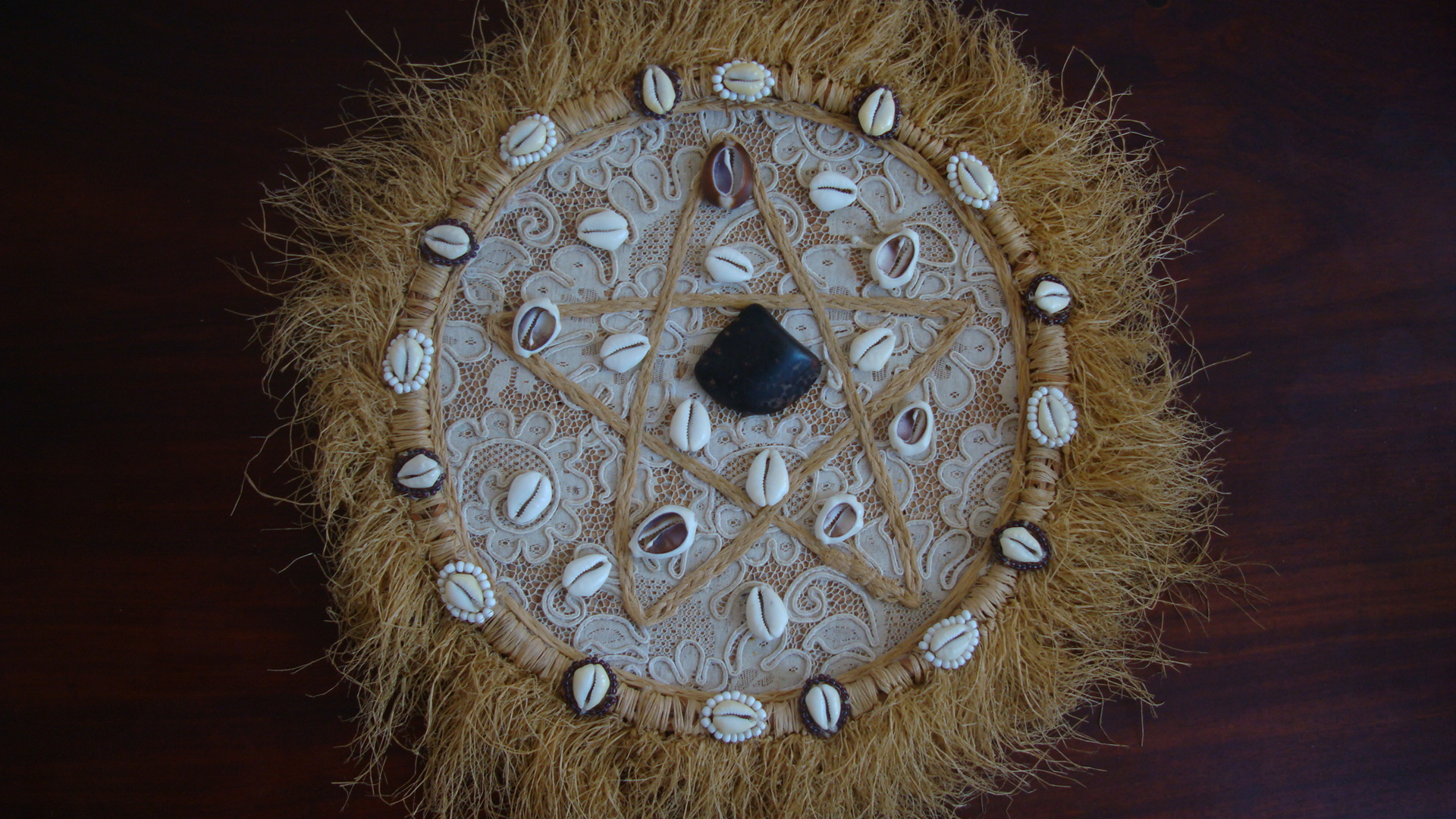 Odu Ôfun Merindilogun, Salvador, Bahia, Brasil.